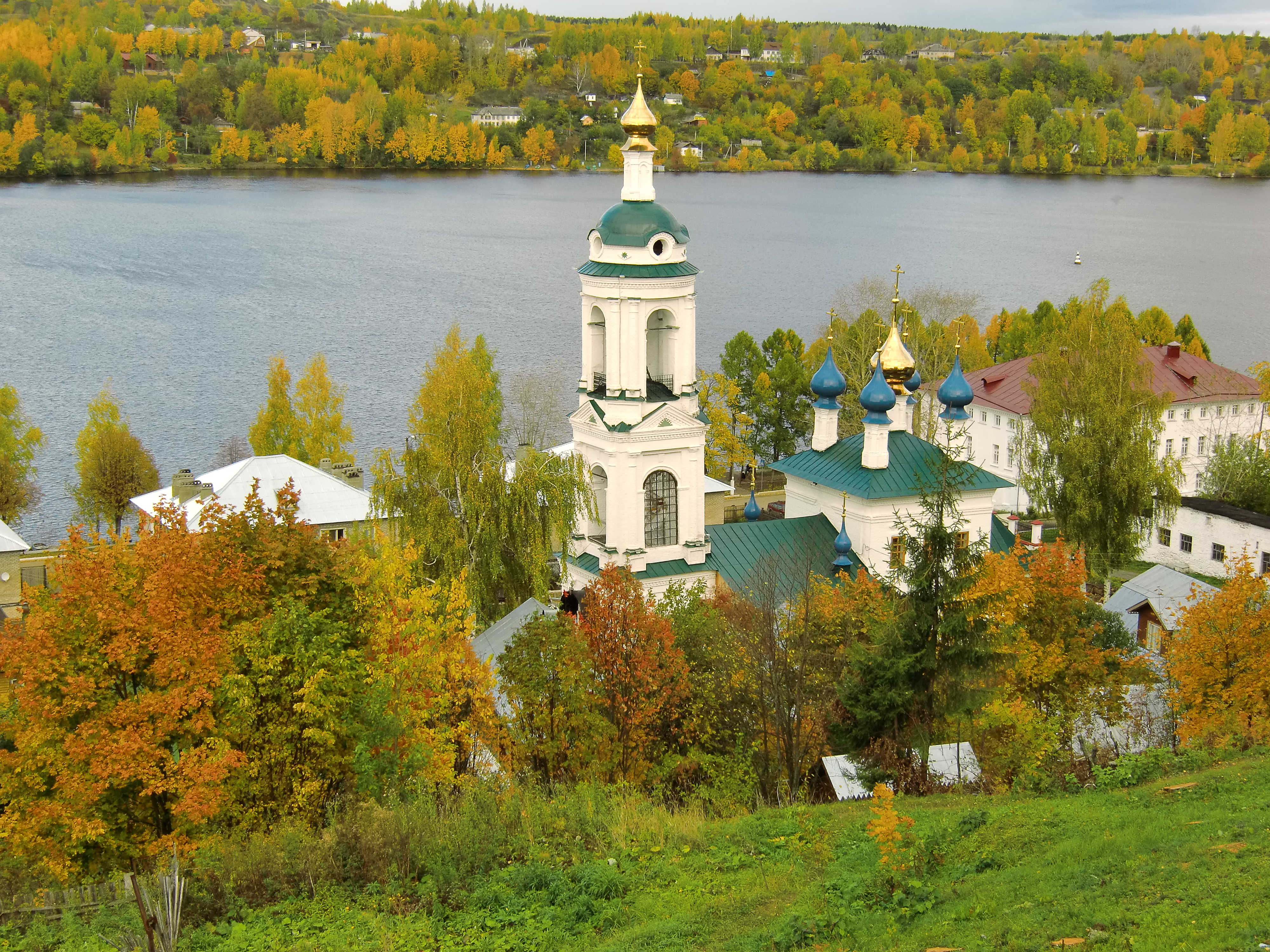 Церковь Варвары Великомученицы в Заречье. (1821 года постройки).